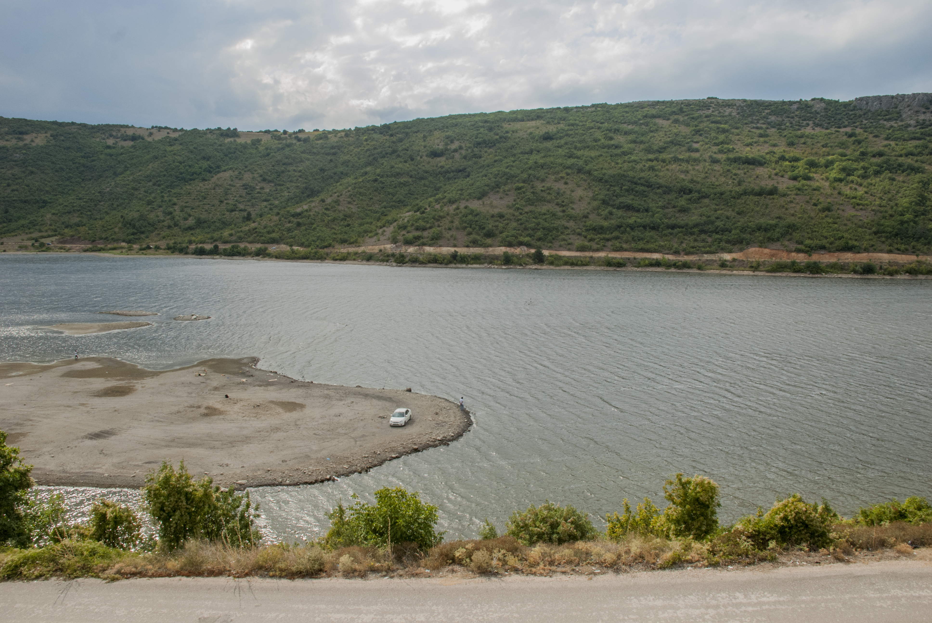 Boğazköy Barajı, İnegöl, Bursa